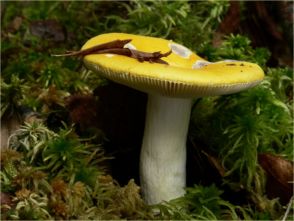 Gelber Graustiel-Täubling (Russula claroflava)